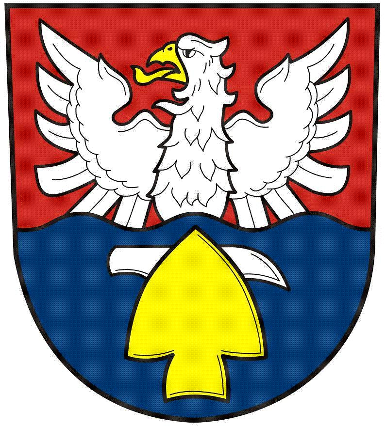 Znak obce Cep (okres Jindřichův Hradec)